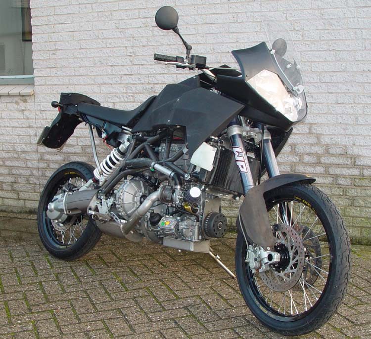 Track T-800CDI dieselmotorcycle. produced by EVA Products BV Holland